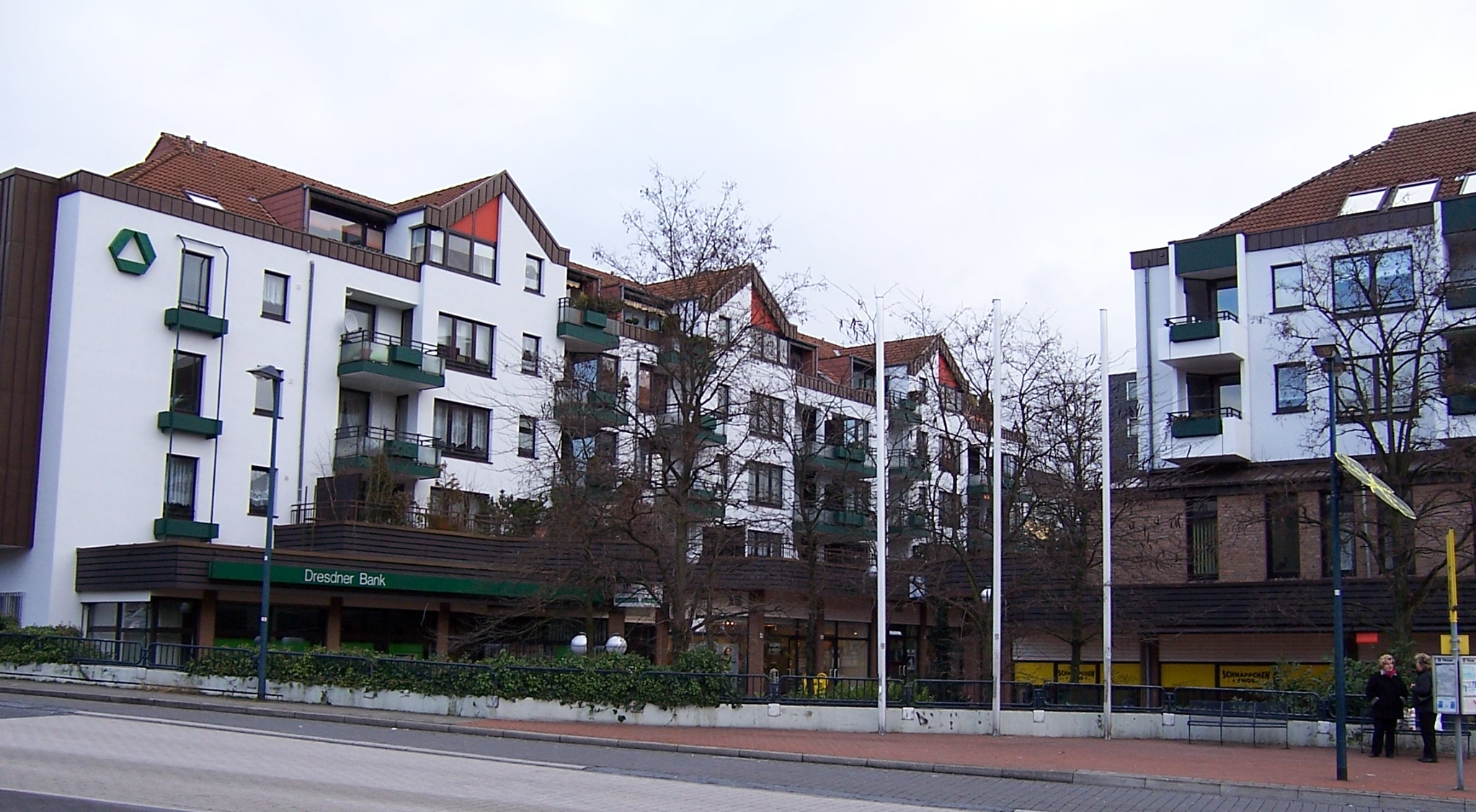 Hochdahler Markt, Erkrath, Germany